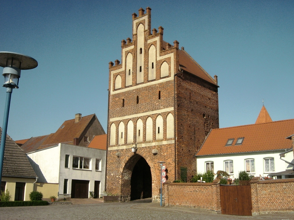 Feldseite des Mühlentores in Triebsees (Vorpommern).